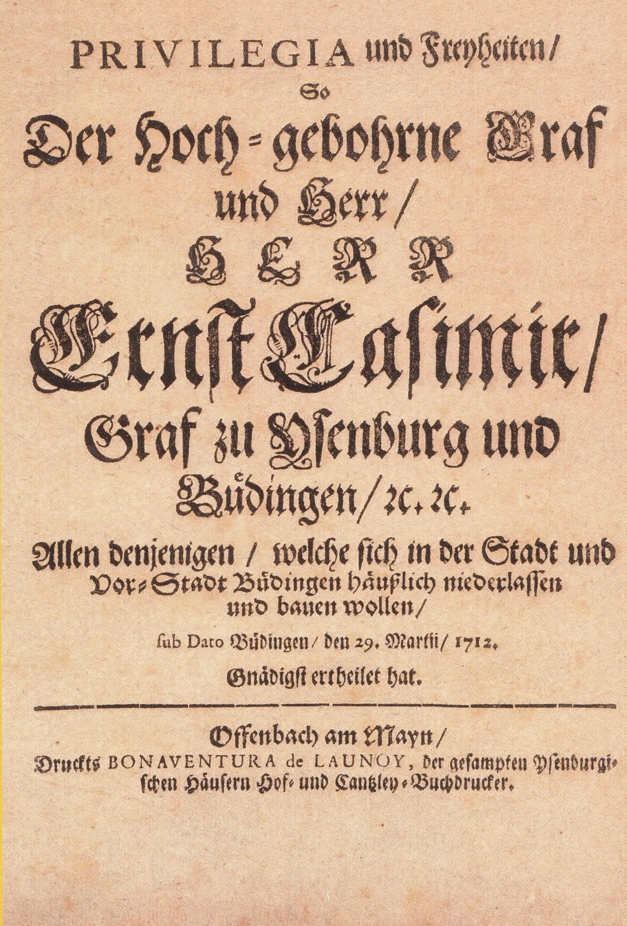 PRIVILEGIA und Freyheiten